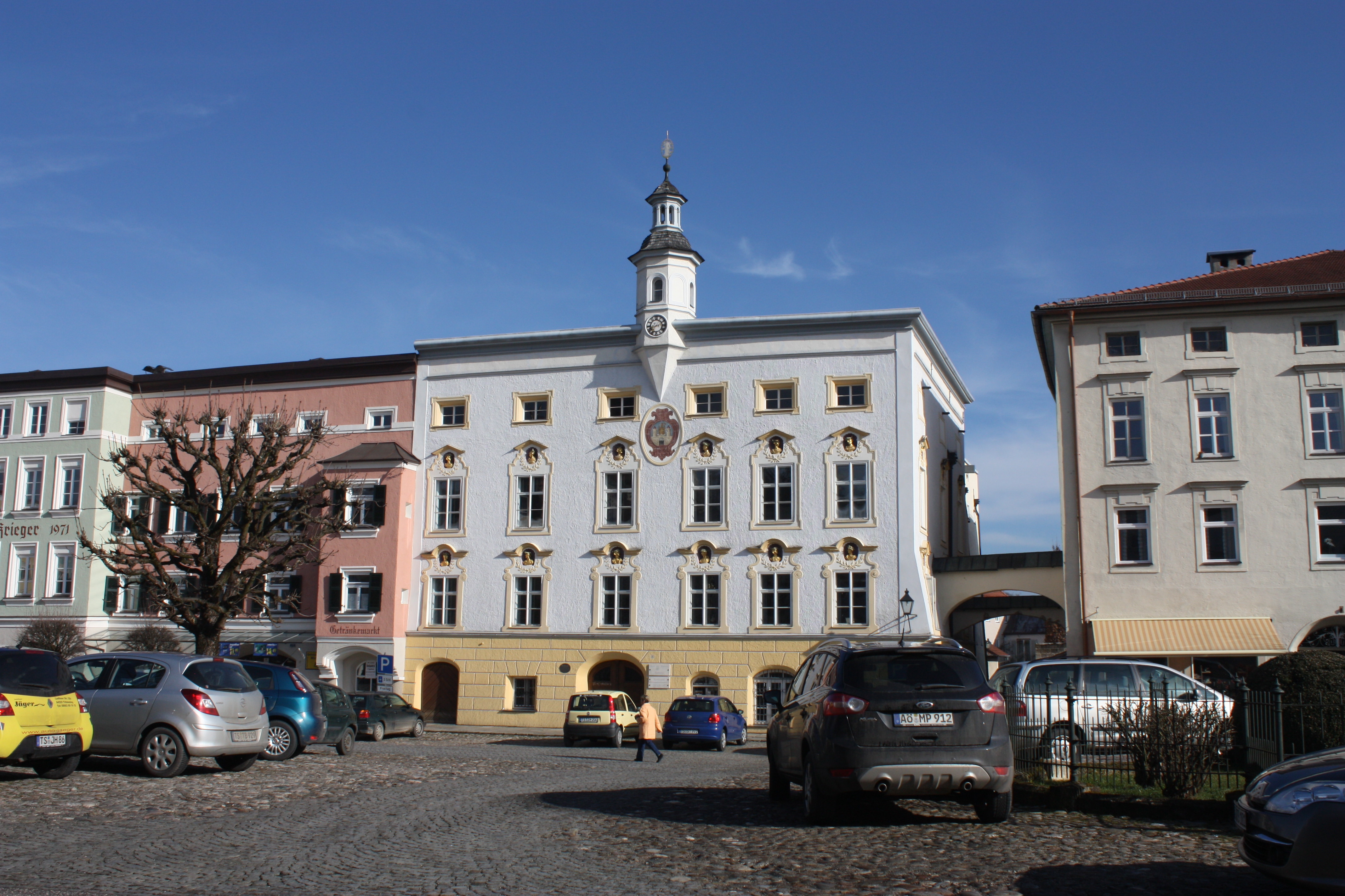 Rathaus Tittmoning am Stadtplatz